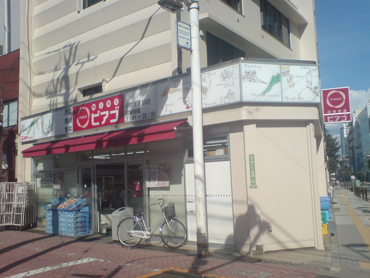 ミニピアゴ足立千住1丁目店